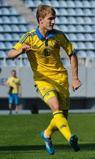 Денис Мірошніченко у фіналі Турніру пам'яті Валерія Лобановського 2015